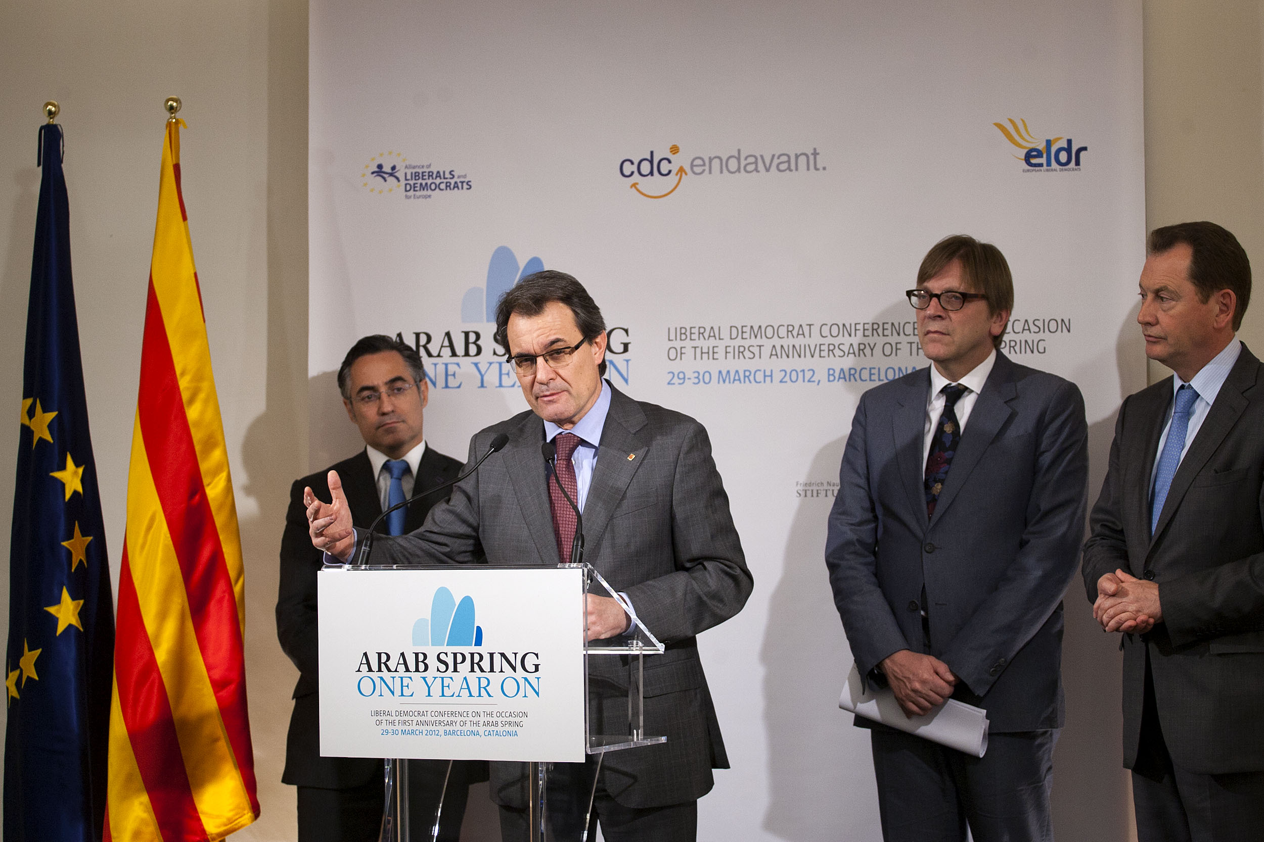 President Mas durant la roda de premsa amb Guy Verhofstadt, Graham Watson i Ramon Tremosa.